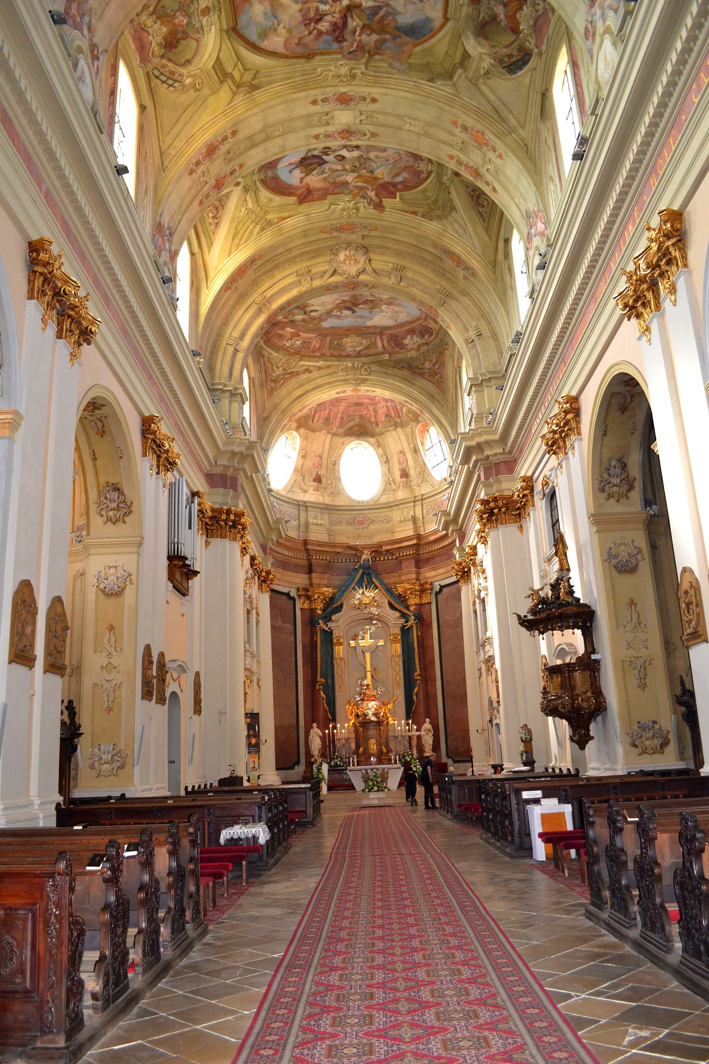 Šaštín-Stráže (okr. Senica), Bazilika Sedembolestnej Panny Márie; pohľad do interiéru